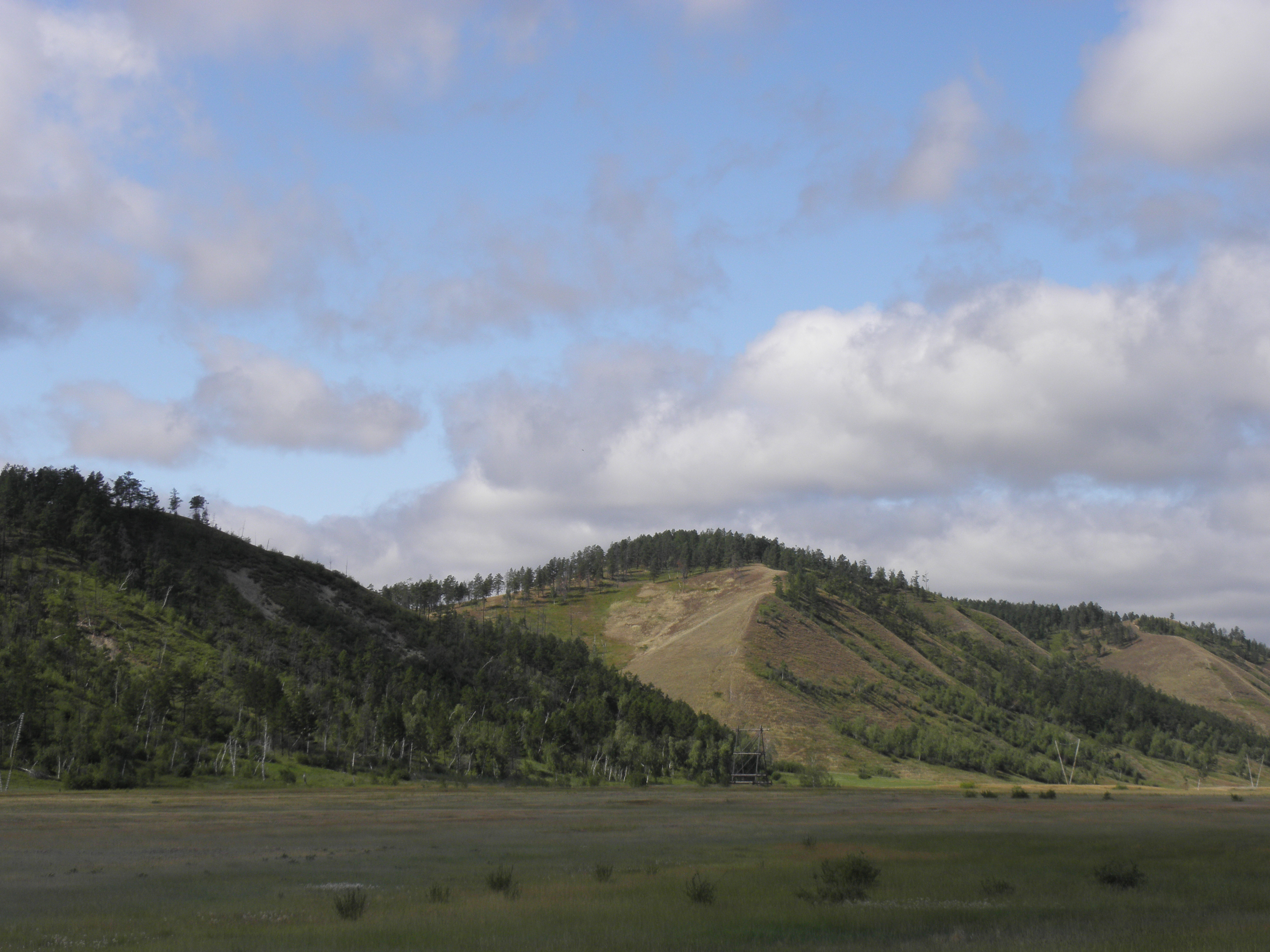 Сопки недалеко от села Новая Табага (Городской округ Якутск).